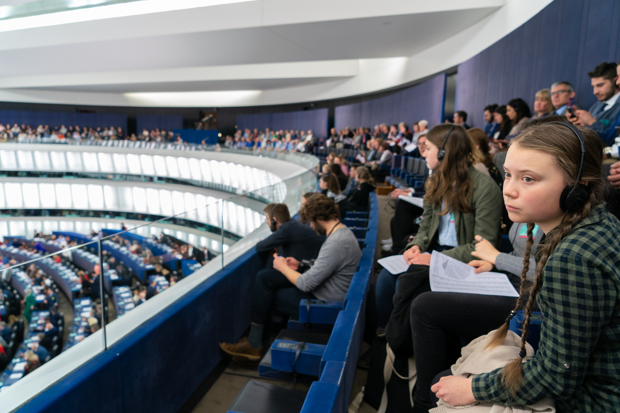 2019 france strasbourg EP EU political leader plenary session european union euroopaparlament europa parlamentet europas parlaments europe european citizens parliament europejski europeu parlamentul europos parlamentas europský europäisches parlament eurostudio európai ewropeweuropees parlaimintn aheorpa euroopan parlamente vropski parlamentil parlamento europeo parlamentti parlamentet parlement européen Parlaimint na hEorpa SONY ALPHA 9